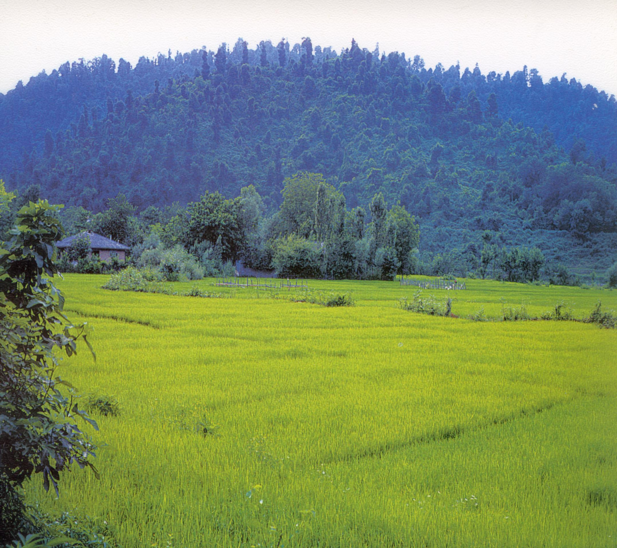 Asaalem Village, Mazandaran, Iran.